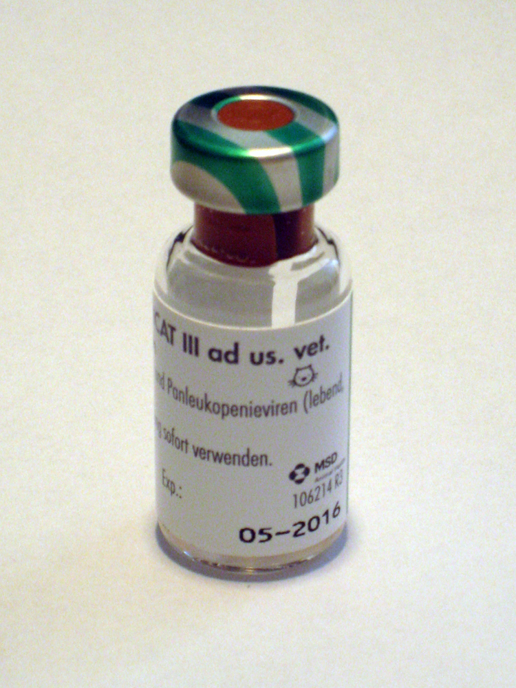 Nobivac TRICAT III ad us. vet. Impfstoff feline Herpes-, Calici- und Panleukopenieviren (lebend, attenuiert)